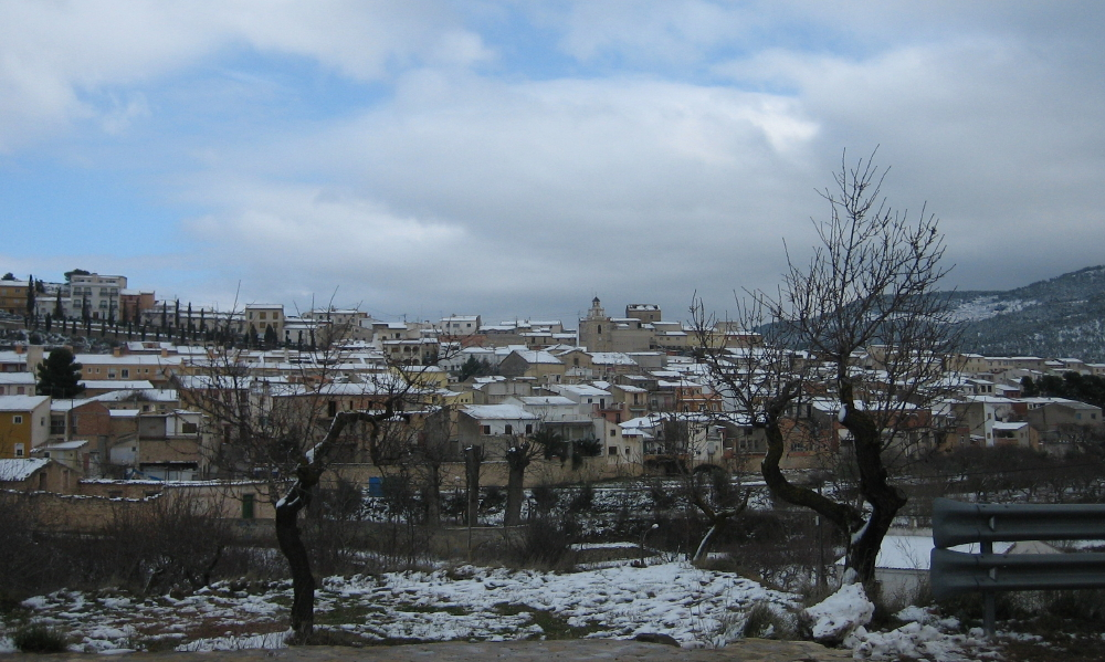 Foto tomada en Torremanzanas (Alicante, España) el 29 de enero de 2006, tras una nevada. Tomada y subida por Rodriguillo y familiares.